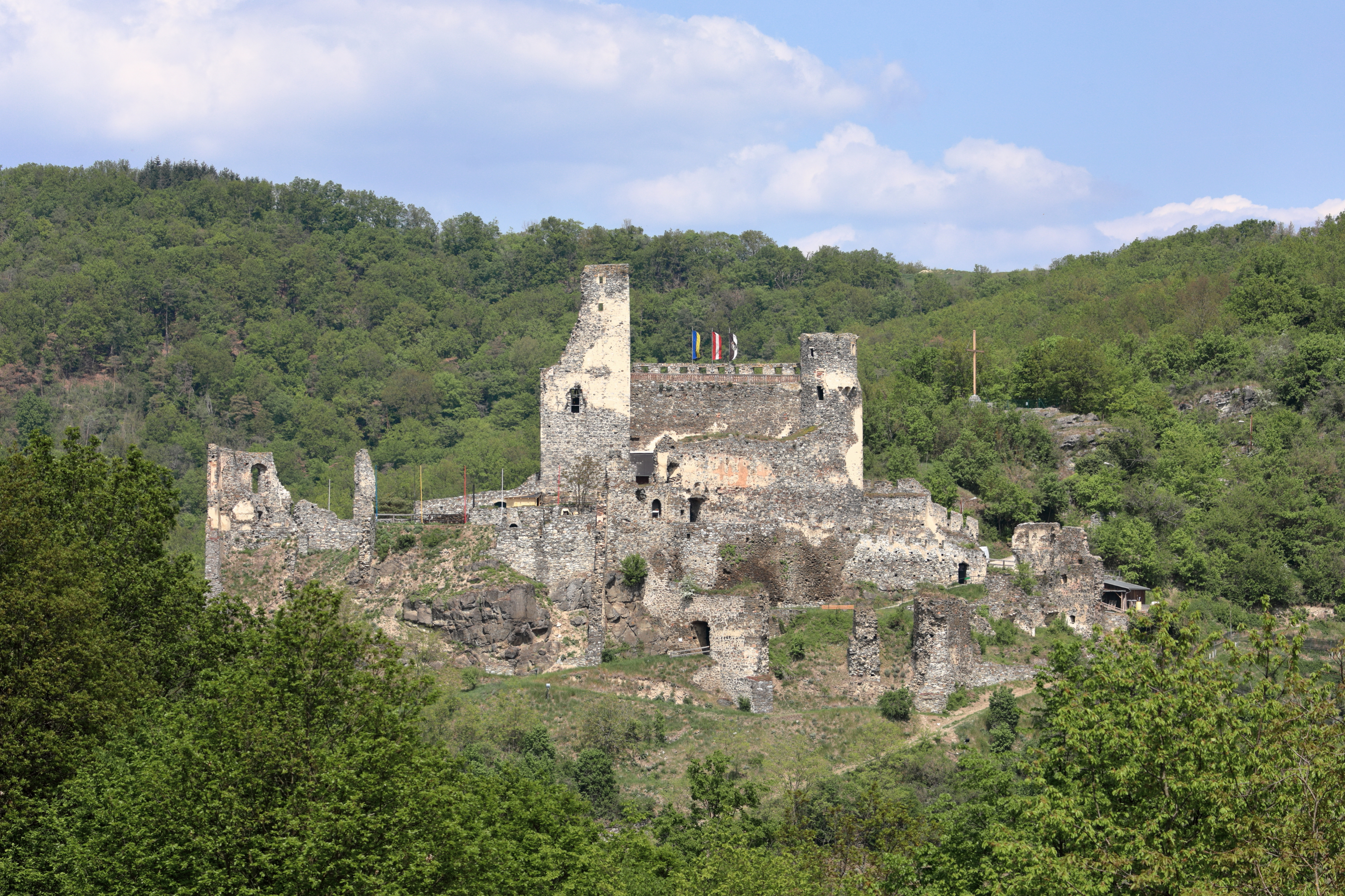 Südansicht der Burgruine in der niederösterreichischen Marktgemeinde Senftenberg.Die Burg wurde vermutlich im 12./13. Jahrhundert errichtet. 1408 wurde sie erobert und zerstört und im 15. Jahrhundert wieder aufgebaut. 1645 wurde sie von den Schweden zerstört und anschließend dem weiteren Verfall preisgegeben.